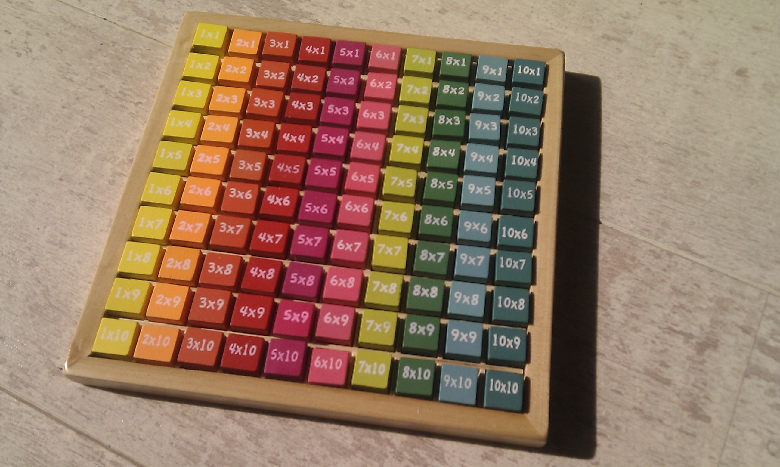 Didactisch materiaal voor het automatiseren van de tafels van vermenigvuldiging.